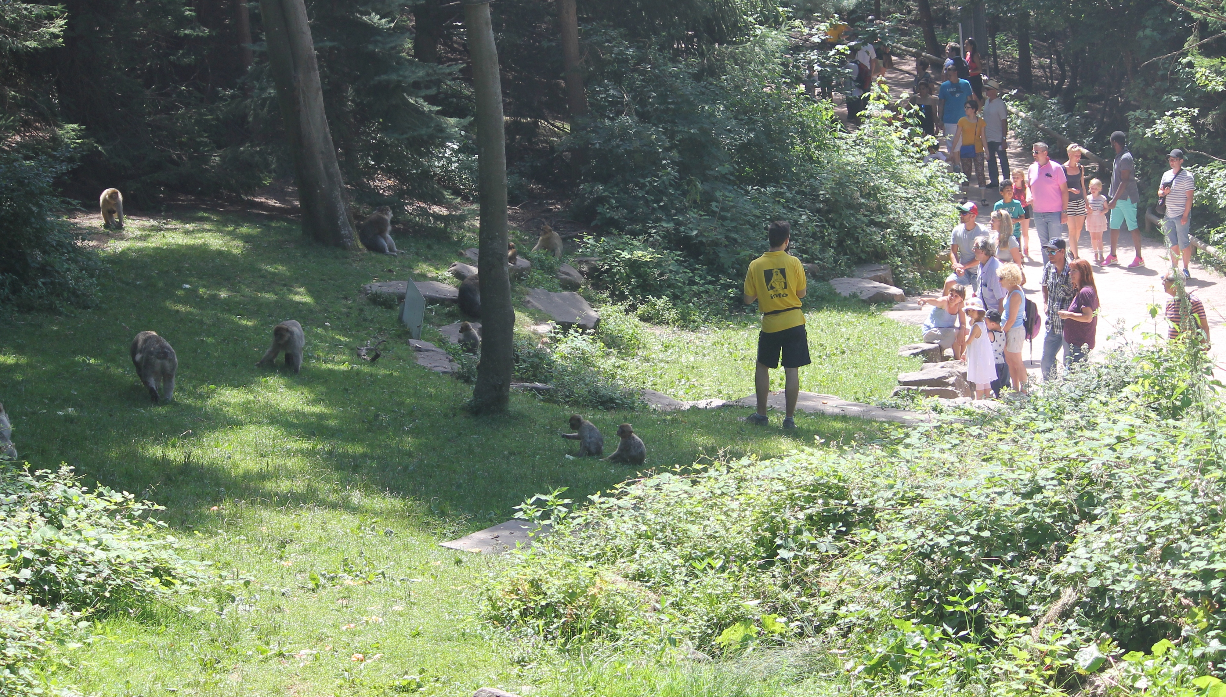 La Montagne des Singes, Kintzheim (2016)